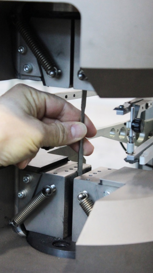 Zugprobeversuch